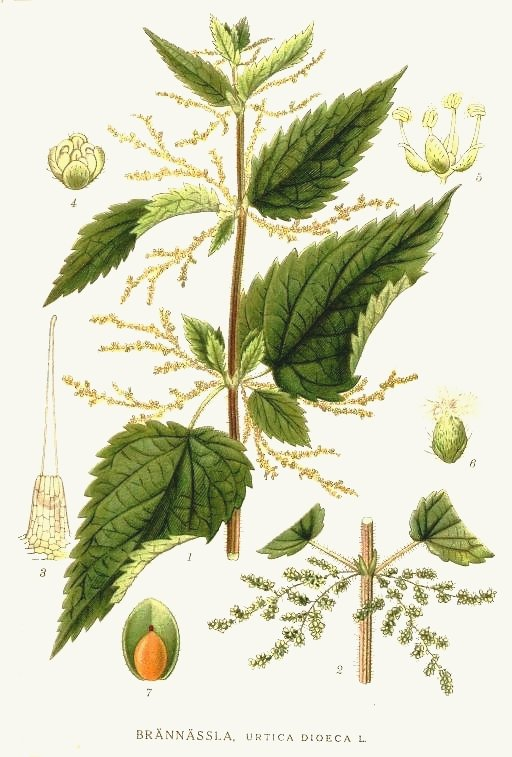 Urtica dioica L. Original Description Brännässla, Urtica dioeca L.